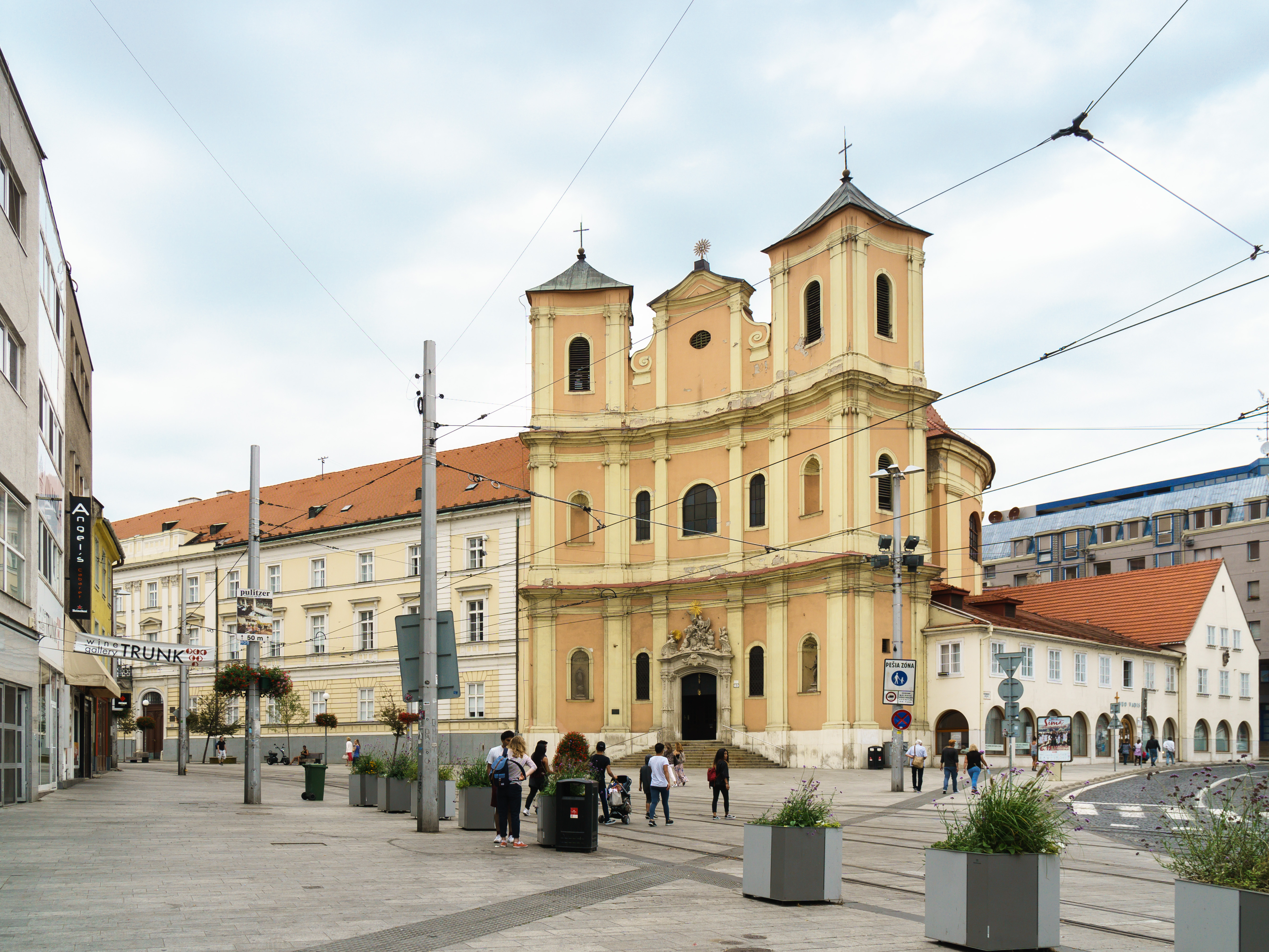 Trinitarierkirche Zupné námestie 11 in Bratislava